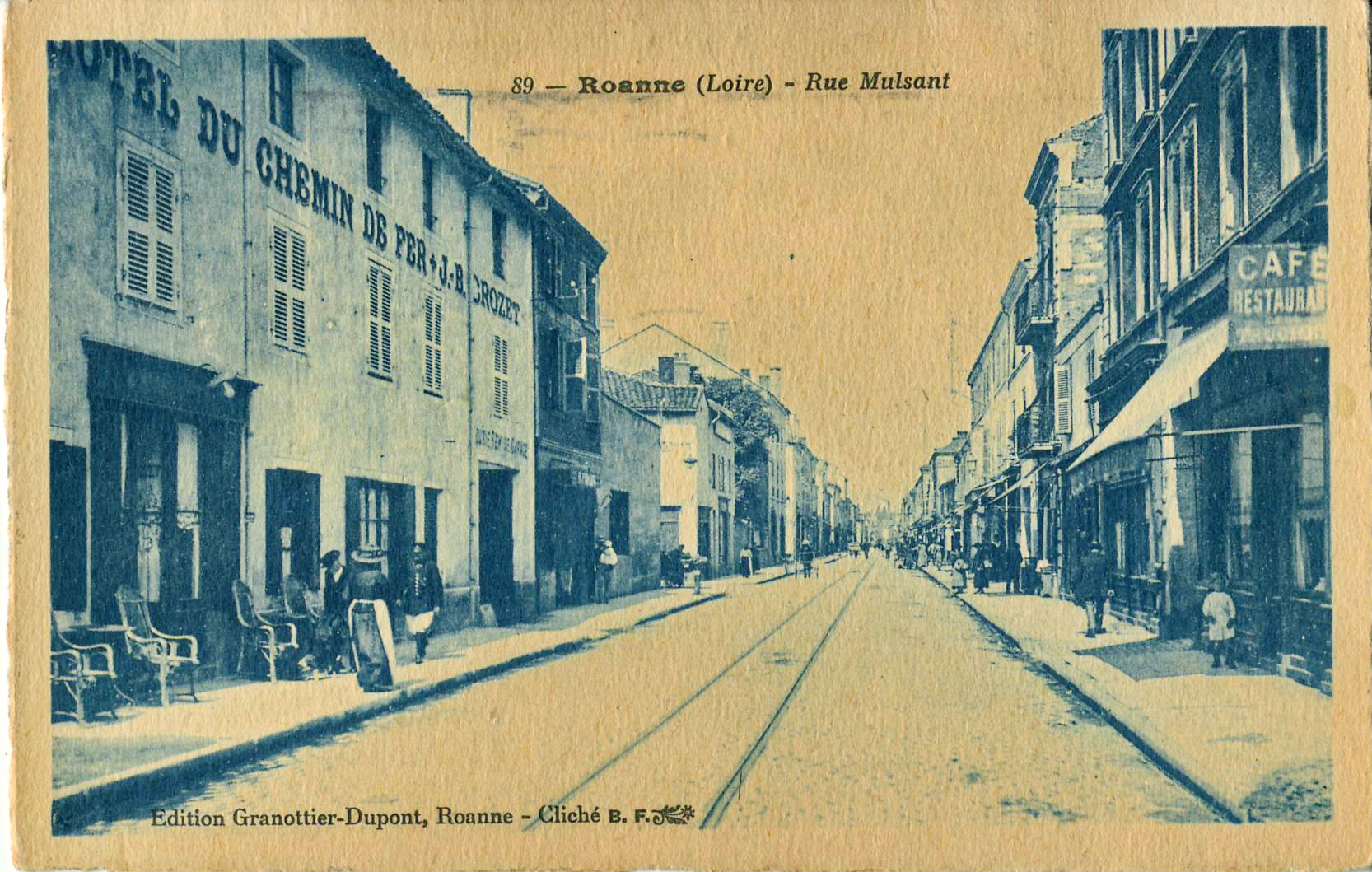 Carte postale ancienne éditée par Granotier-Dupont à Roanne, cliché BF à Paris : ROANNE - Rue Mulsant